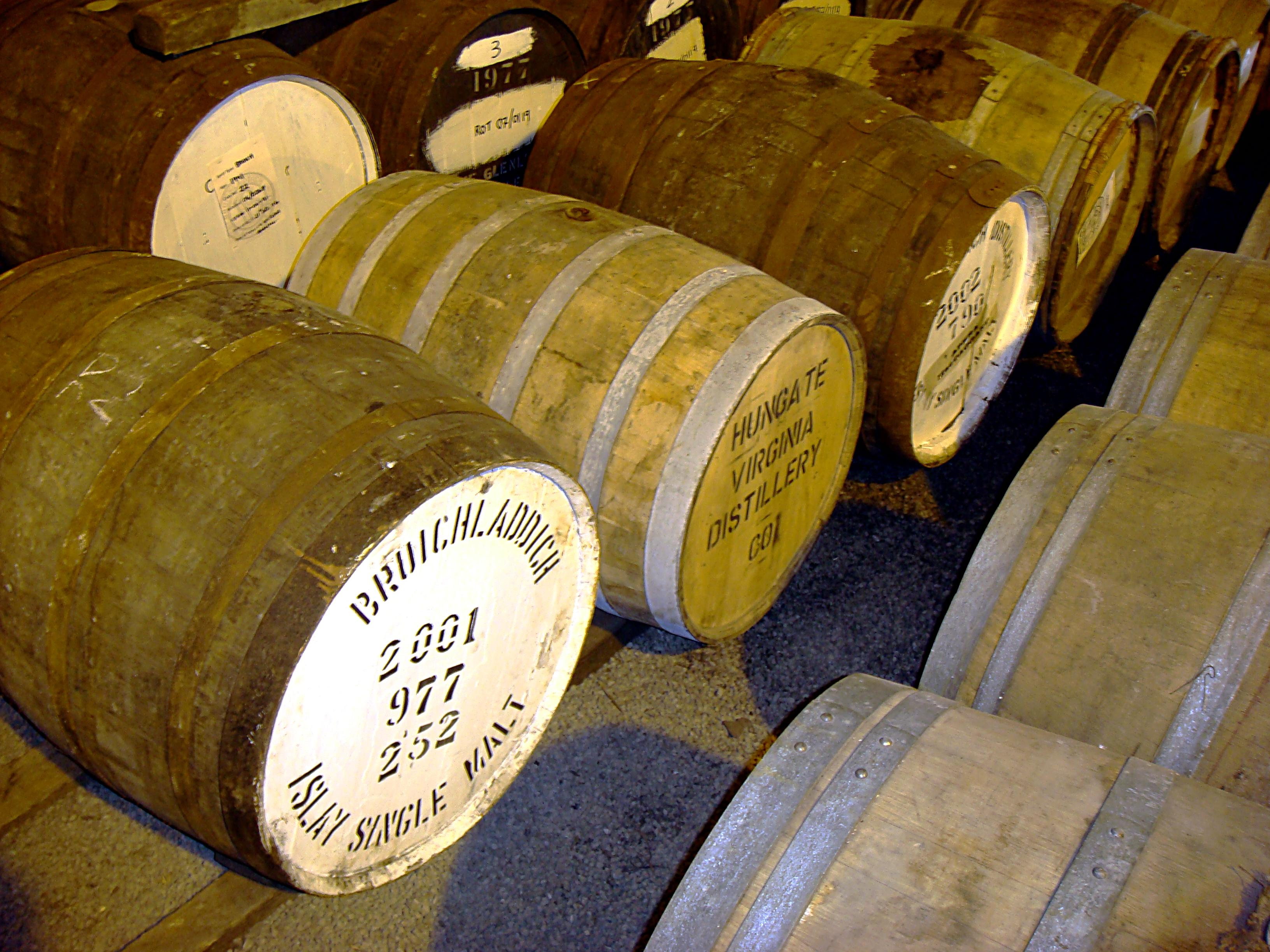 Lagerung von Whisky